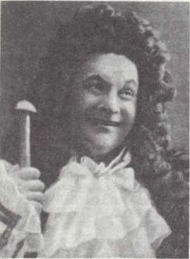 Г. Грыгоніс у ролі Журдэна